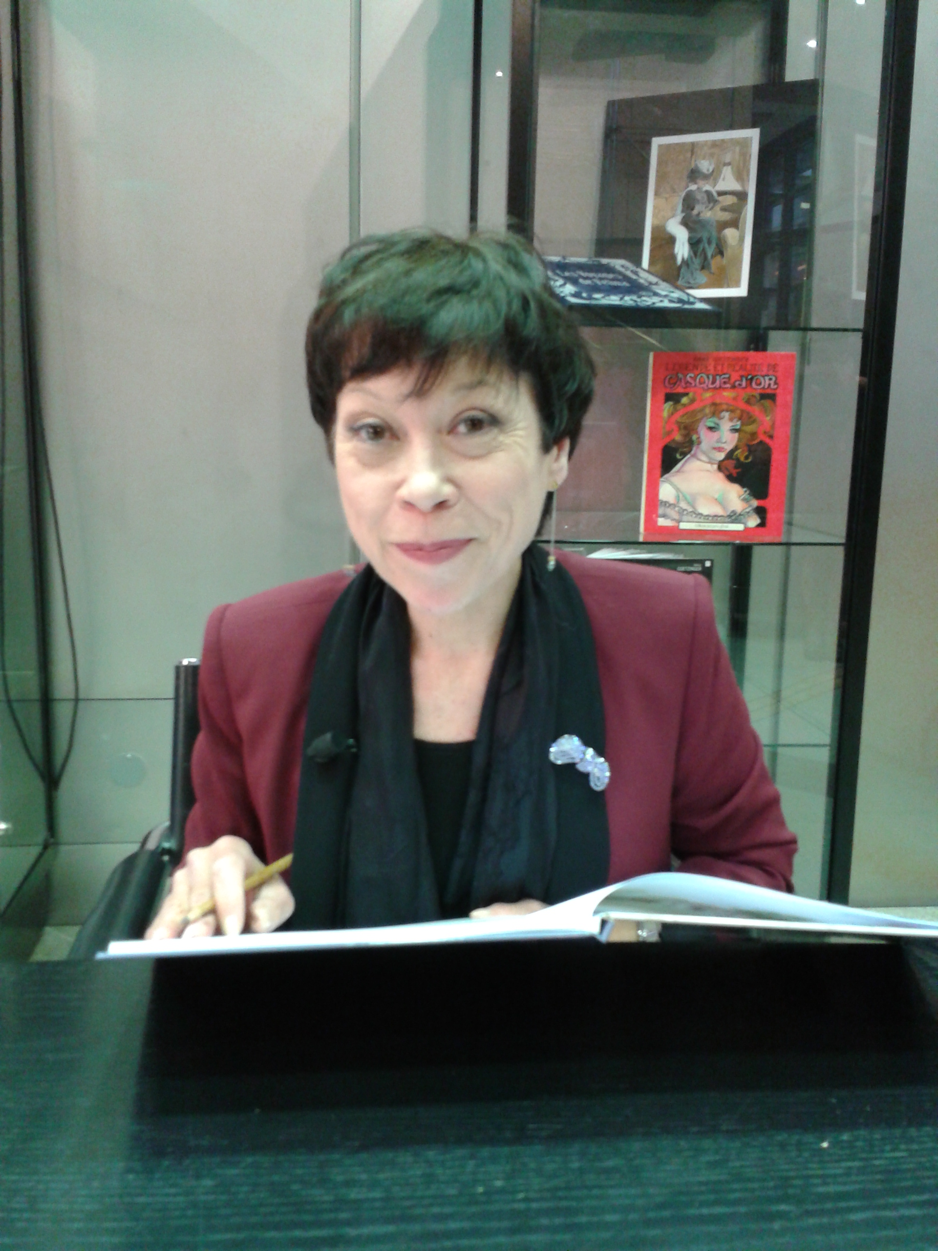 Annie Goetzinger lors d'une séance de dédicace